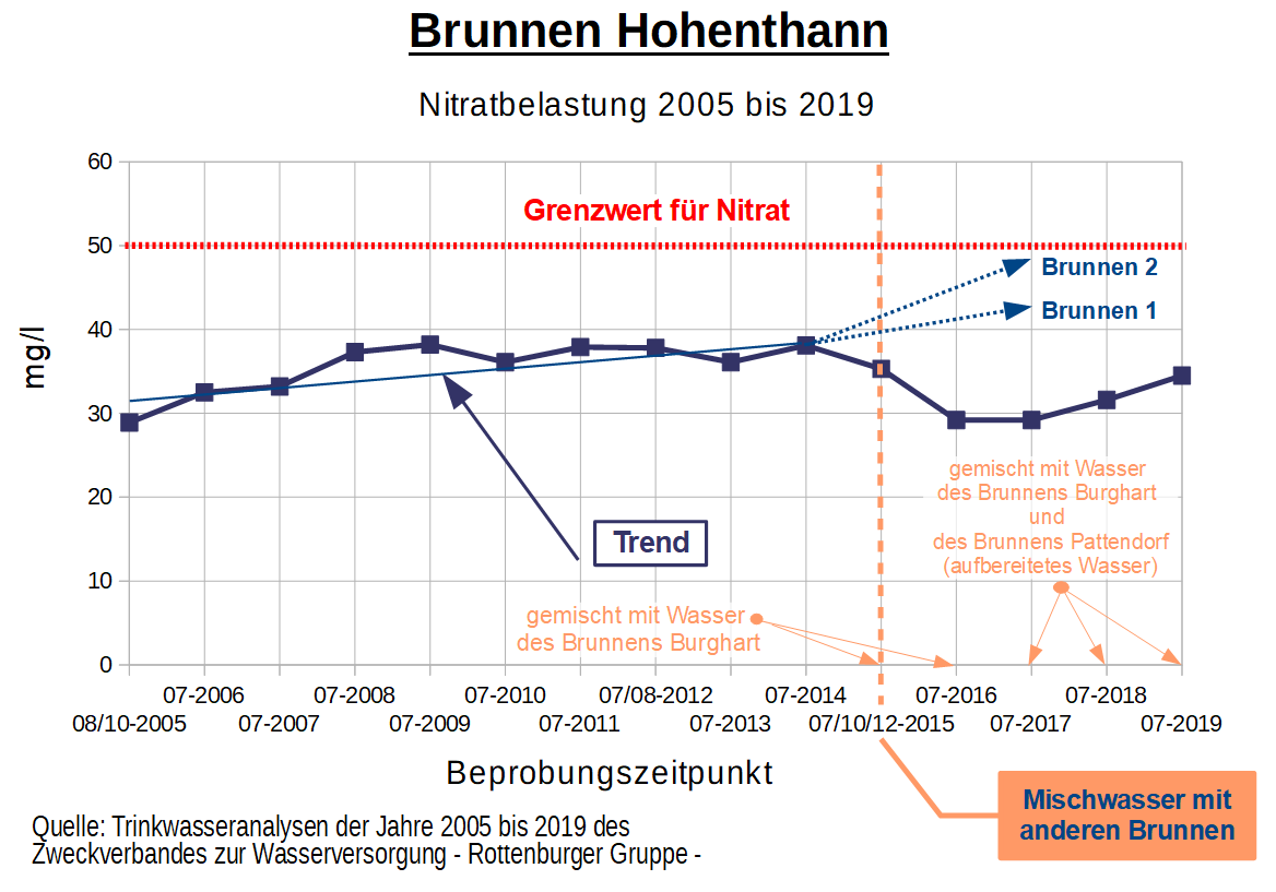 Auswertung der jährlichen Wasseranalyse zum Erschließungsgebiet Hohenthann für den Zeitraum 2005 bis 2013